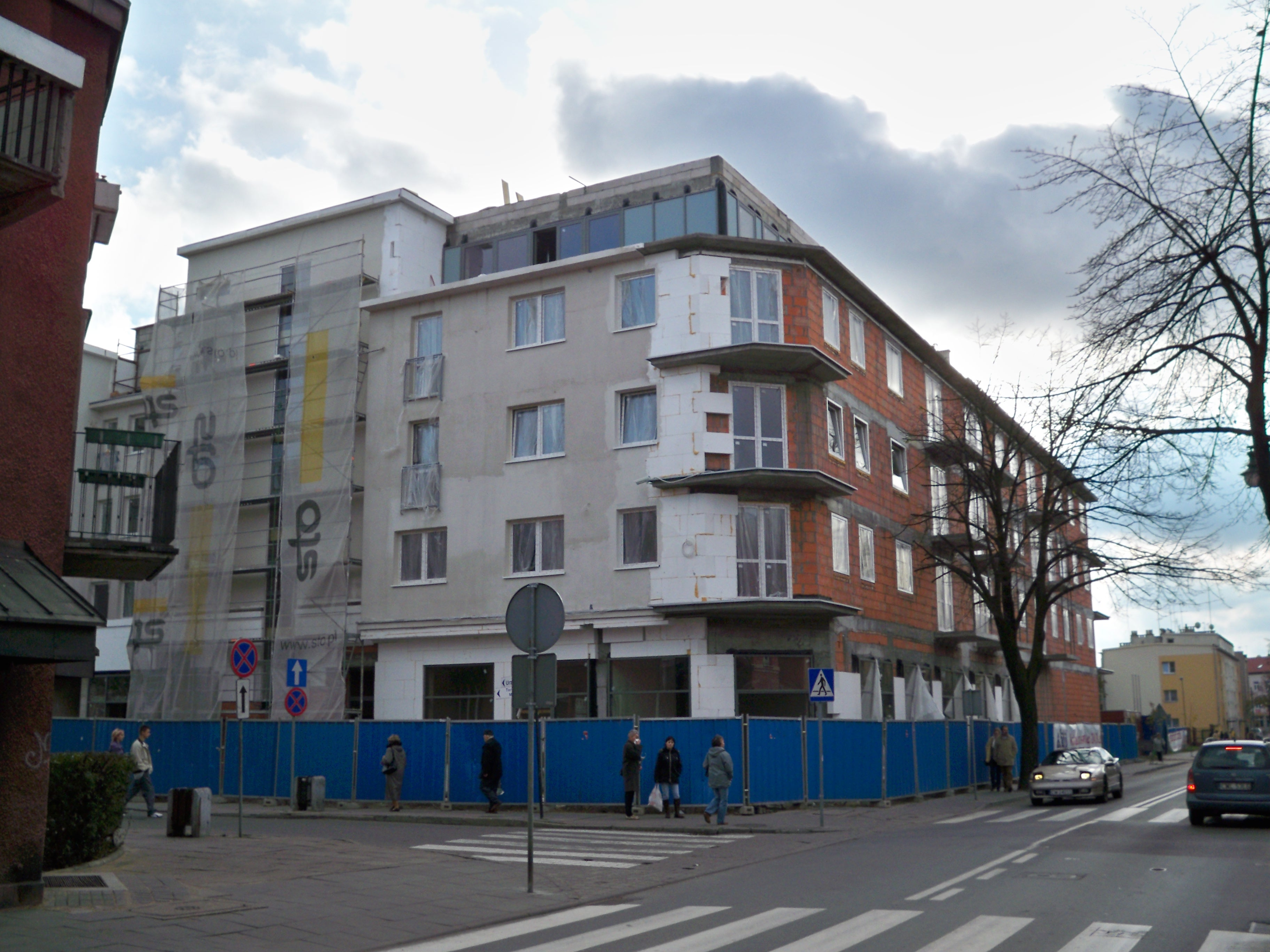 Budowa budynku przy ul. Królewieckiej 41/43 (2009 r.) we Włocławku